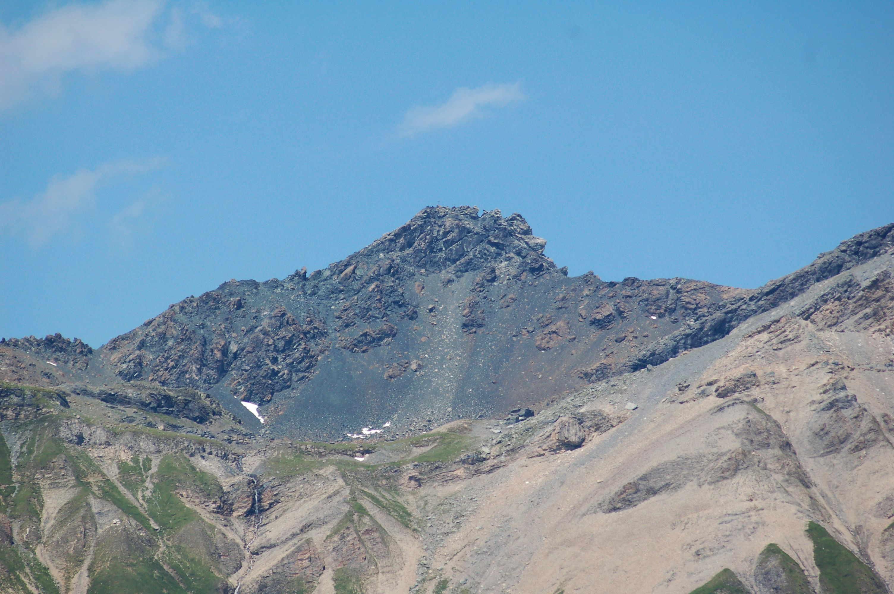 Die Südseite des Lizumer Reckners vom Durrachjöchl aus betrachtet; auffällig das blau-graue Geröll auf dem Südhang